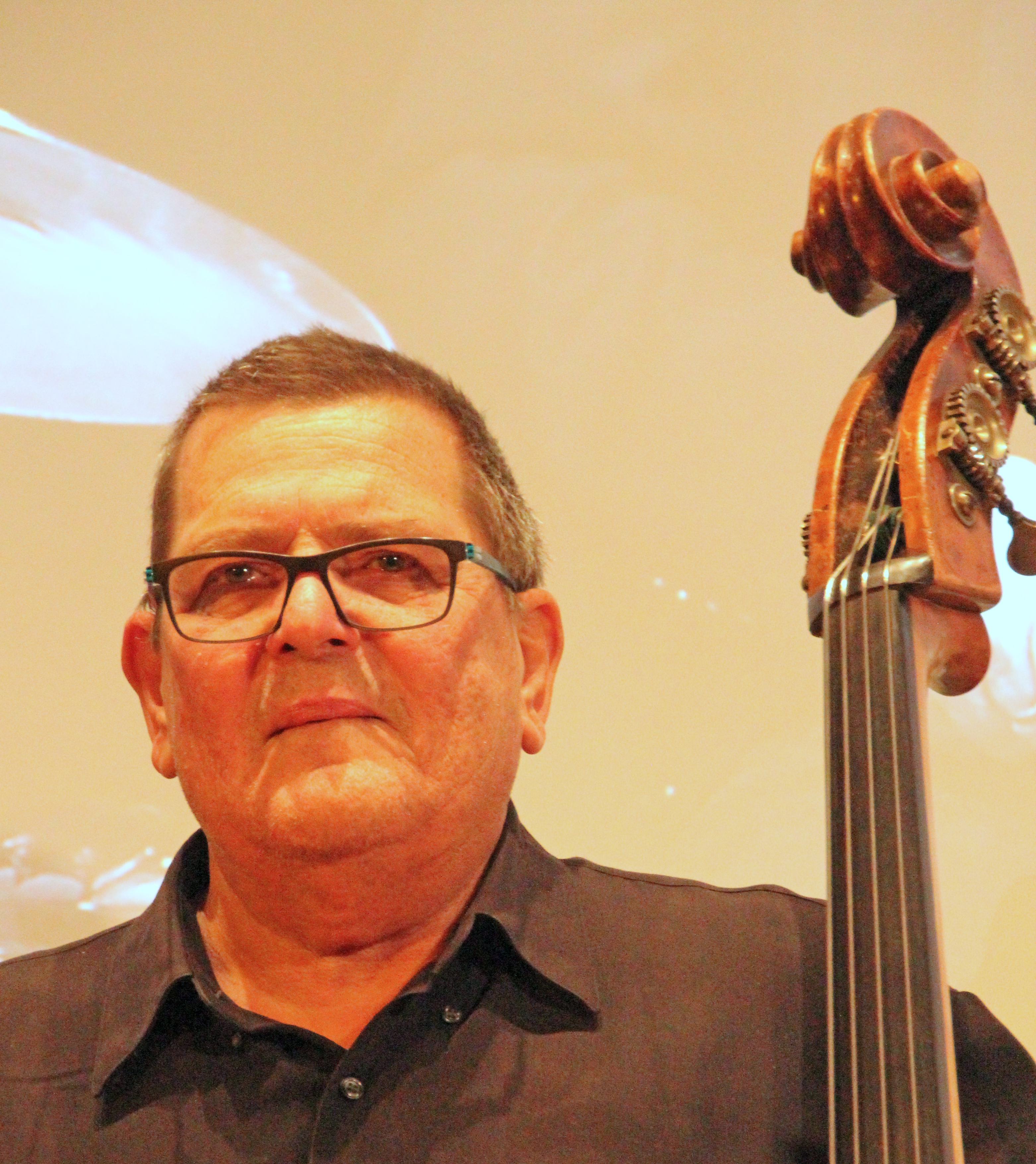 Bildinhalt: Jürgen Wuchner bei einem Konzert zum Tode von Janusz Stefański im Holzhausenschlösschen in Ffm Aufnahmeort: Frankfurt am Main, Deutschland Die dargestellte Person wurde bei einem öffentlichen Auftritt fotografiert.